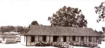 Pejabat Kajibumi di Batu Gajah, Perak pada tahun 1908.